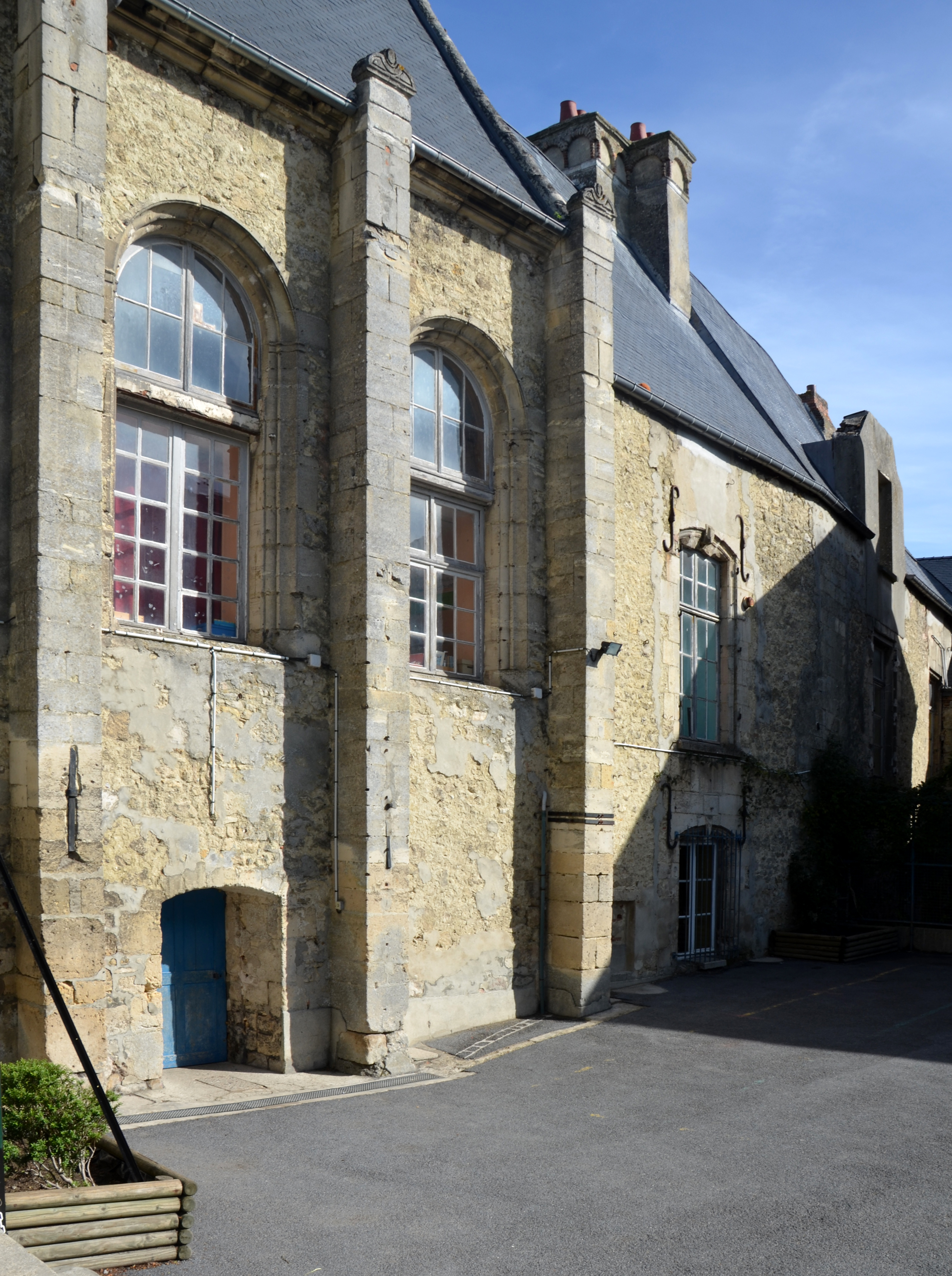 Ancien Hotel du petit Val Saint-Pierre, ou ancien prieuré du Val-des-Ecoliers, 40 rue Vinchon Laon, Aisne, France.